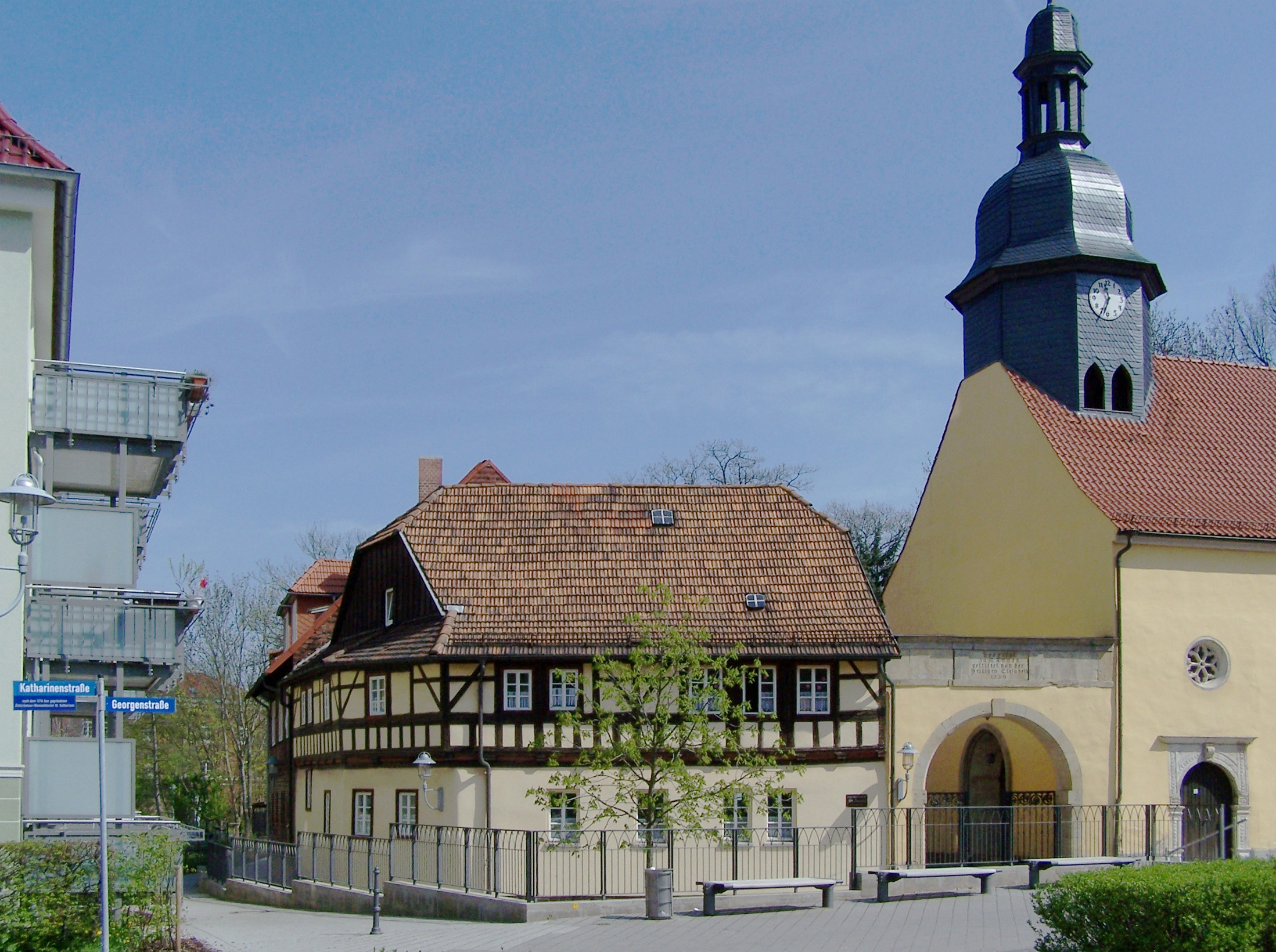 Annenstift